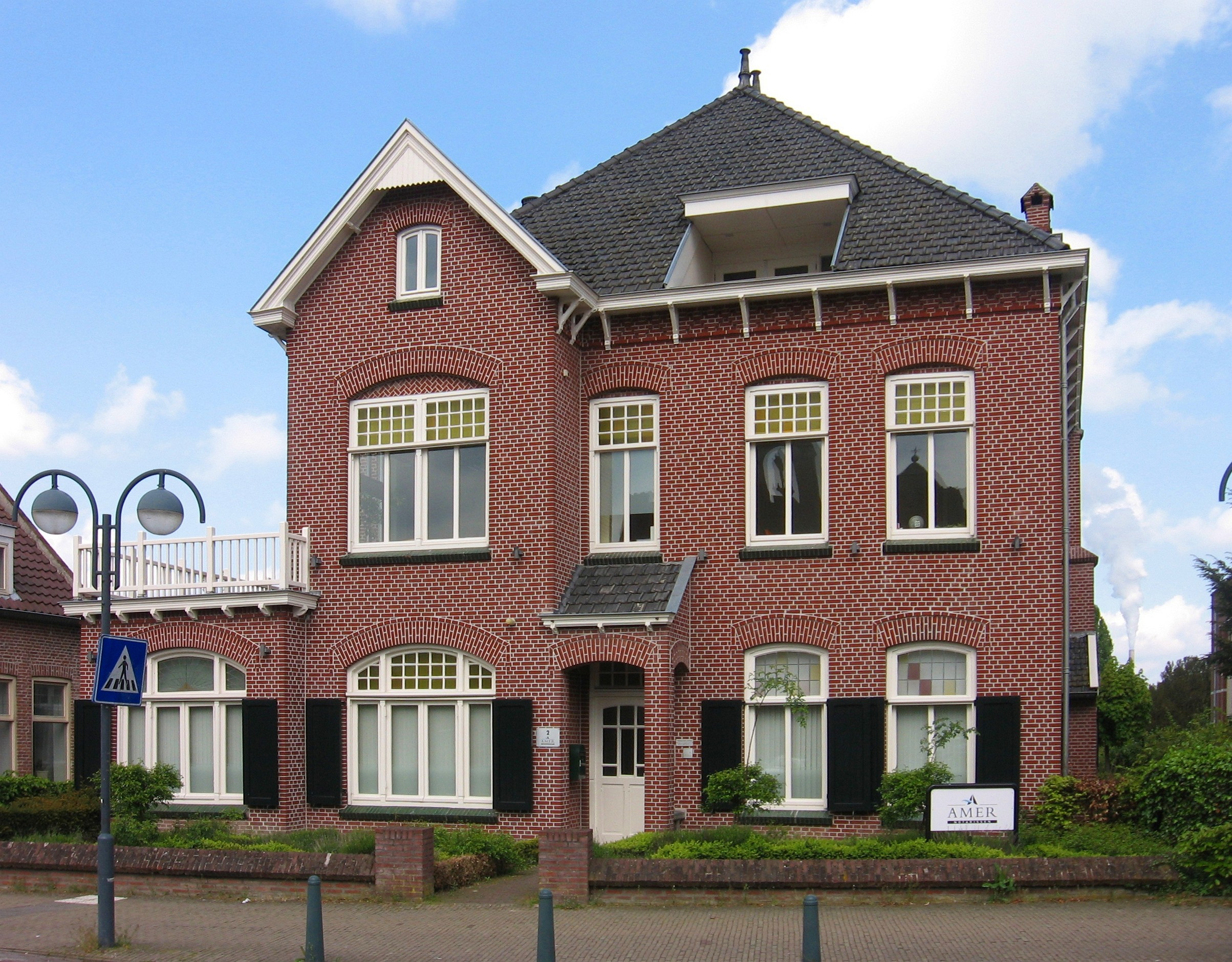 Zicht op een woning, Grote Kerkstraat 2 in Raamsdonksveer Raamsdonksveer 11 2010.jpg, characteristic buildings Grote Kerkstraat 2